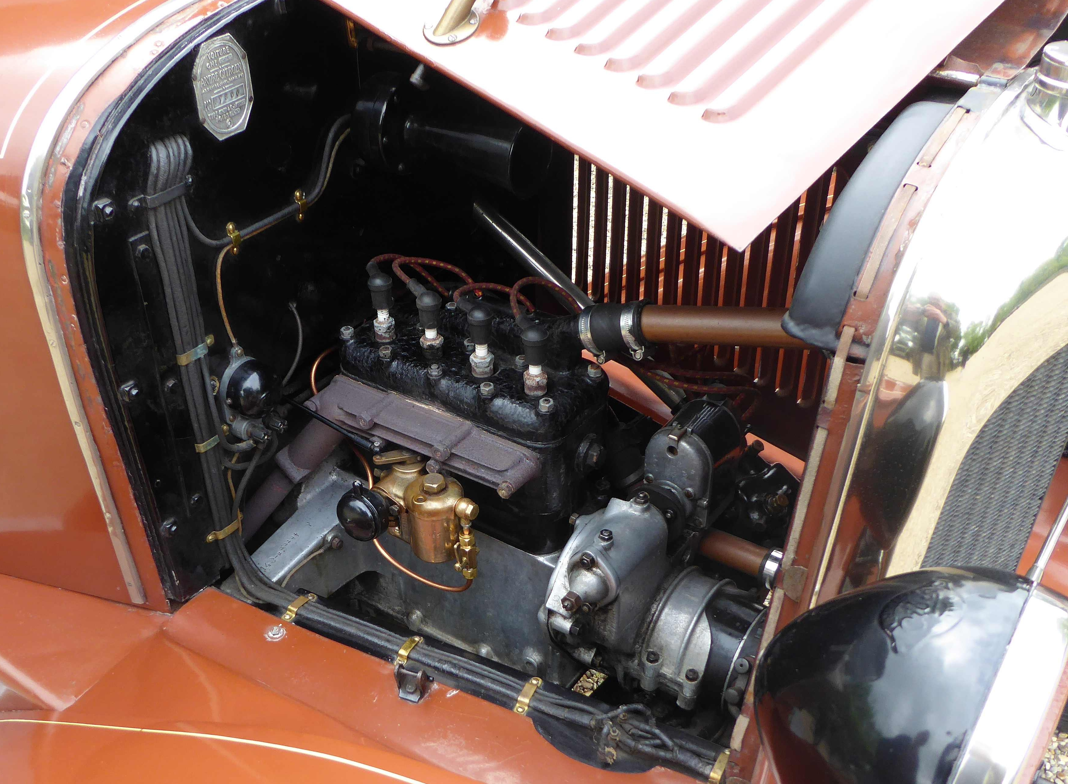 Moteur 5HP 1924